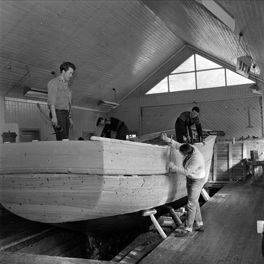 Båtbyggerskolen på Rognan. Menn som bygger båt. Saltdal, Nordland, april.1963. Fra Dagbladets negativarkiv som Norsk Folkemuseum overtok i 2003.